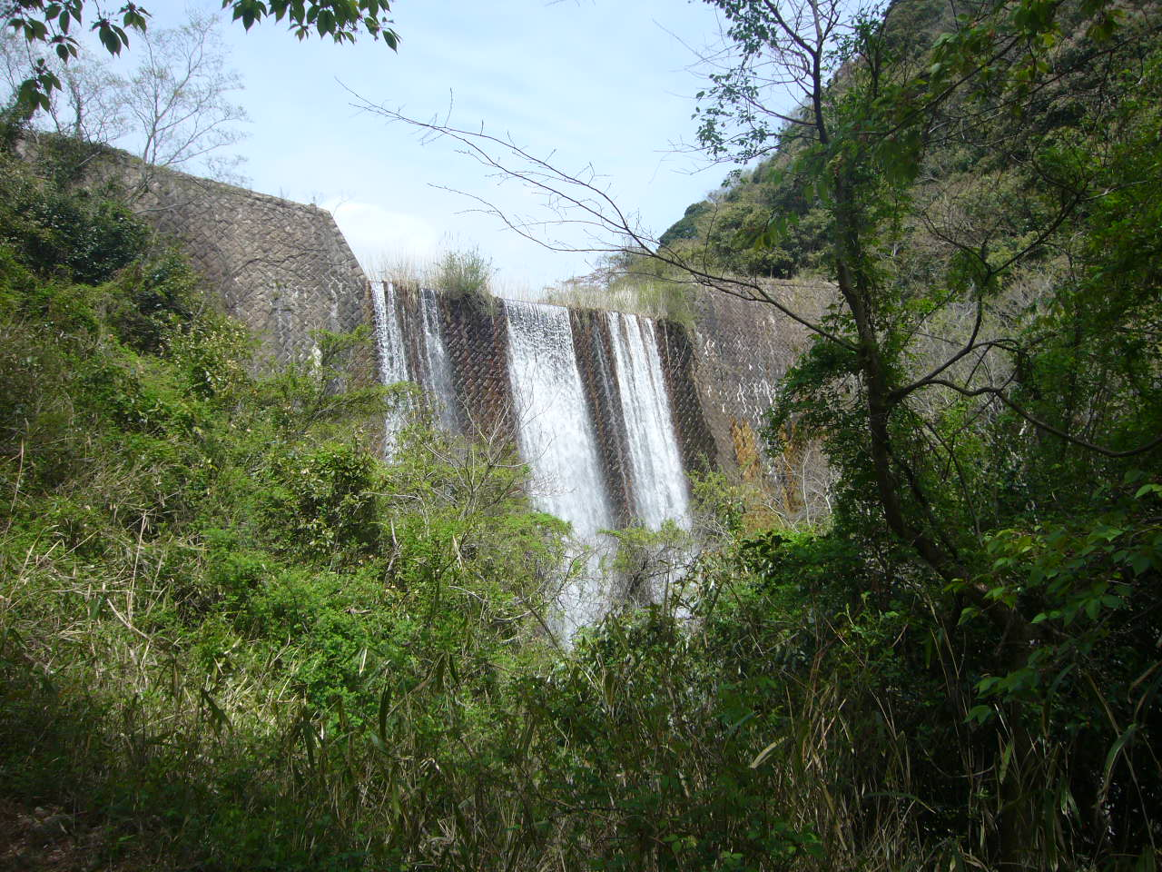 五助堰堤の画像です。2017年4月22日撮影。Panasonic Lumix DMC-FX01